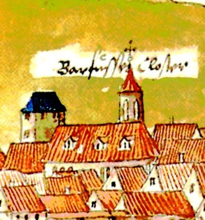 Das Heilbronner Franziskanerkloster um 1557. Detail von File:Heilbronn 1557.jpg